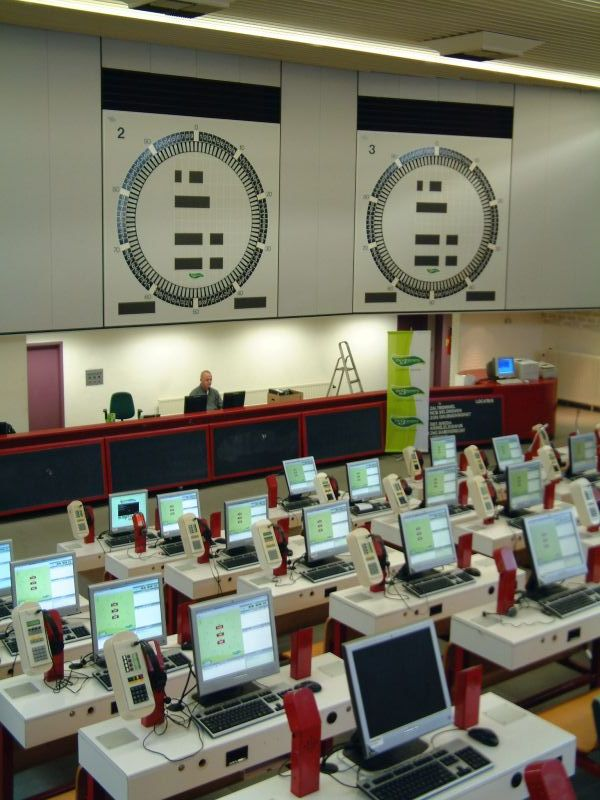 Veilingklokken bij The Greenery in Breda.